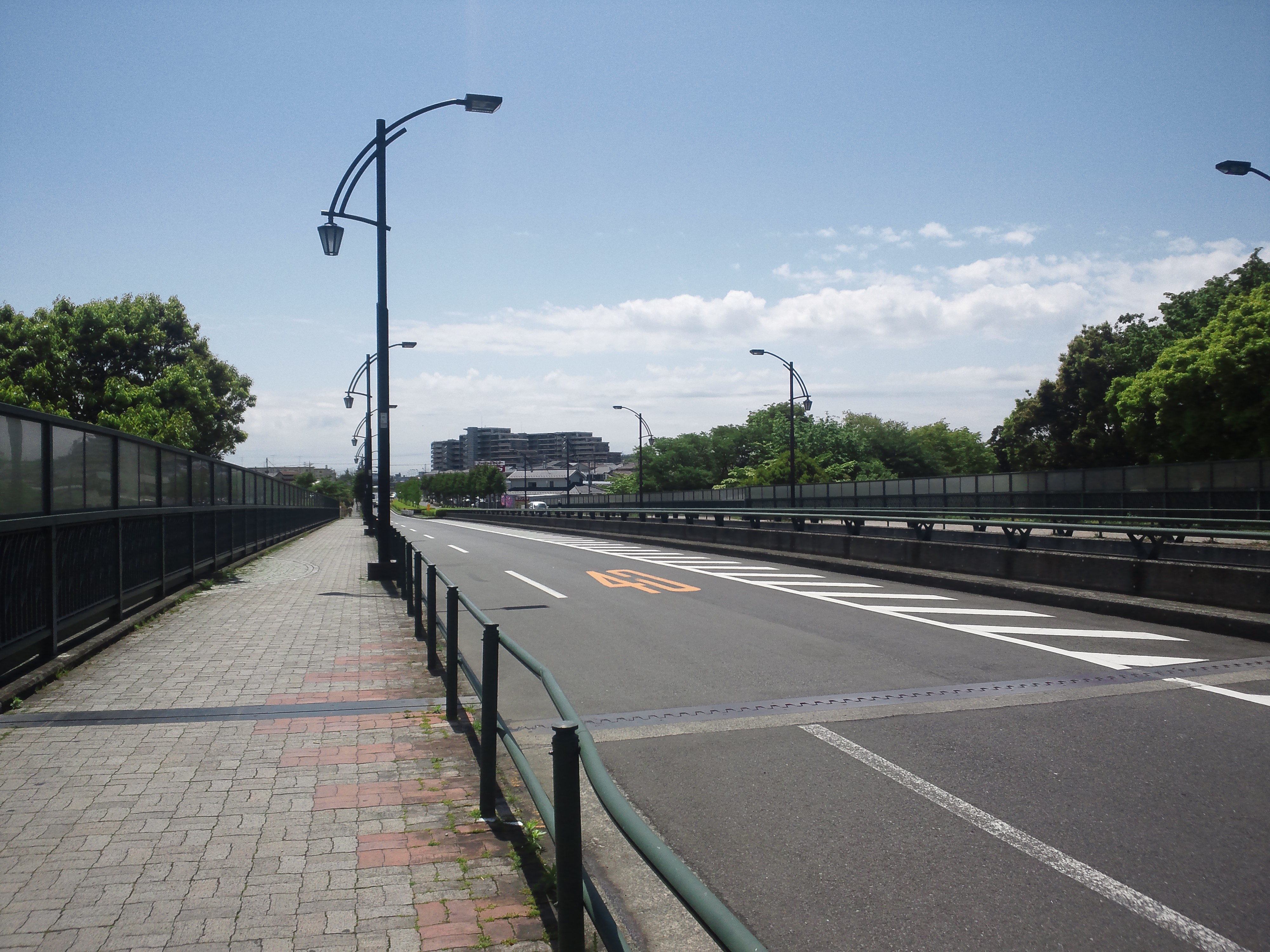 忠生公園大橋（町田市山崎町）